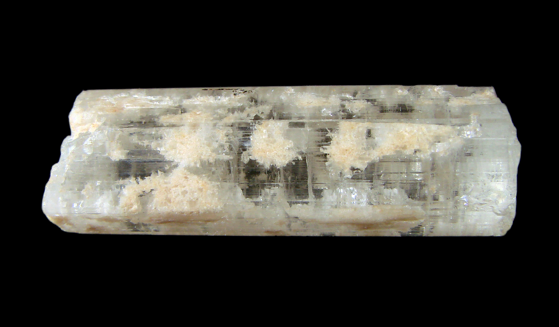 Cristal de phénacite(3 cm environ).